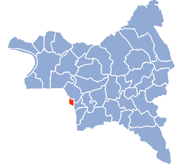 Auteur Hervé SUAUDEAU Licensing Catégorie:Cartes de Seine-saint-Denis Catégorie:Le Pré-Saint-Gervais